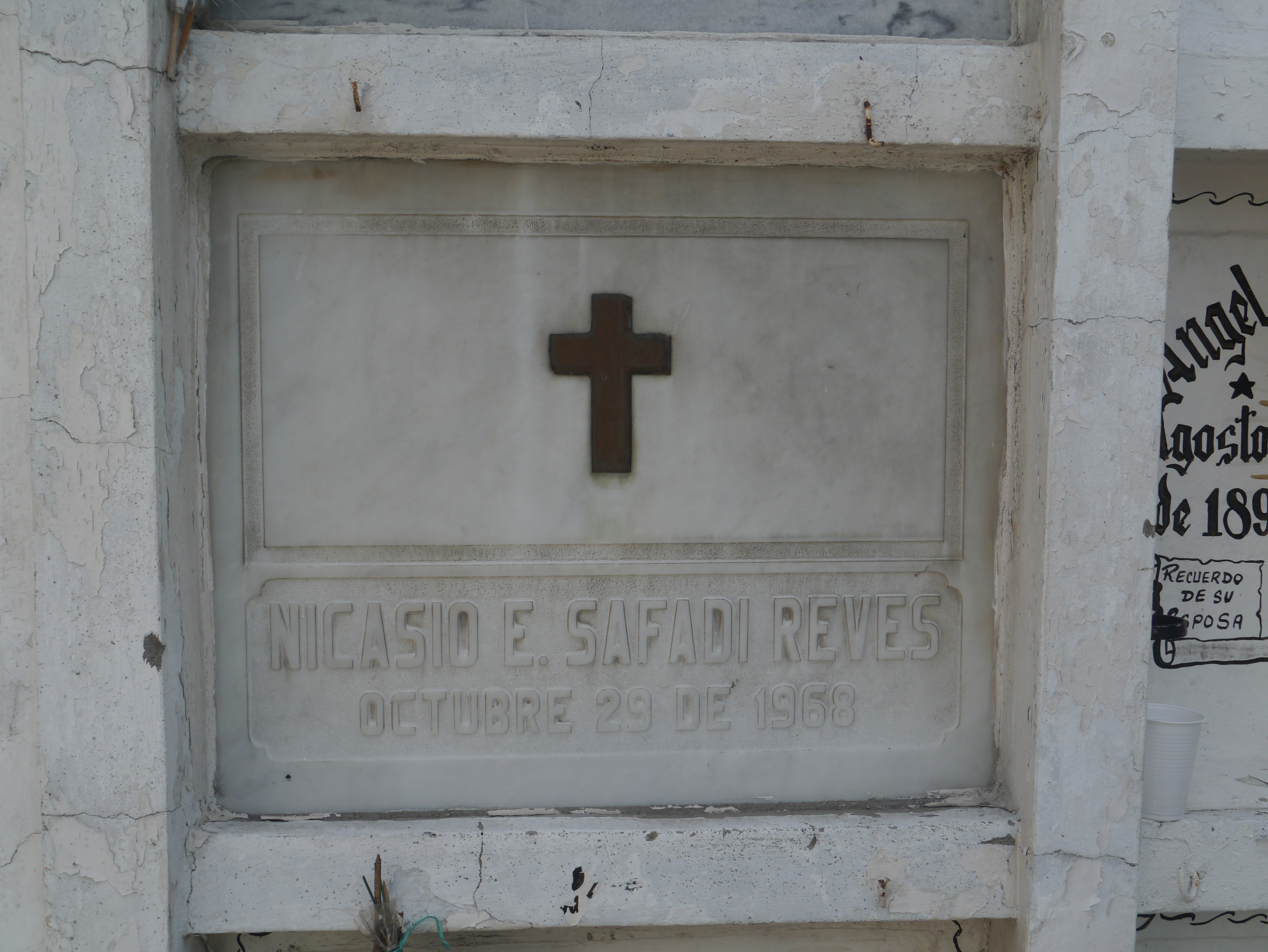 Bóveda de Nicasio Safadi, compositor guayaquileño en el Cementerio General de Guayaquil.